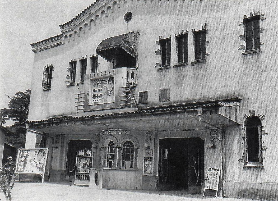 名古屋市中区上長者町にあった八重垣劇場。